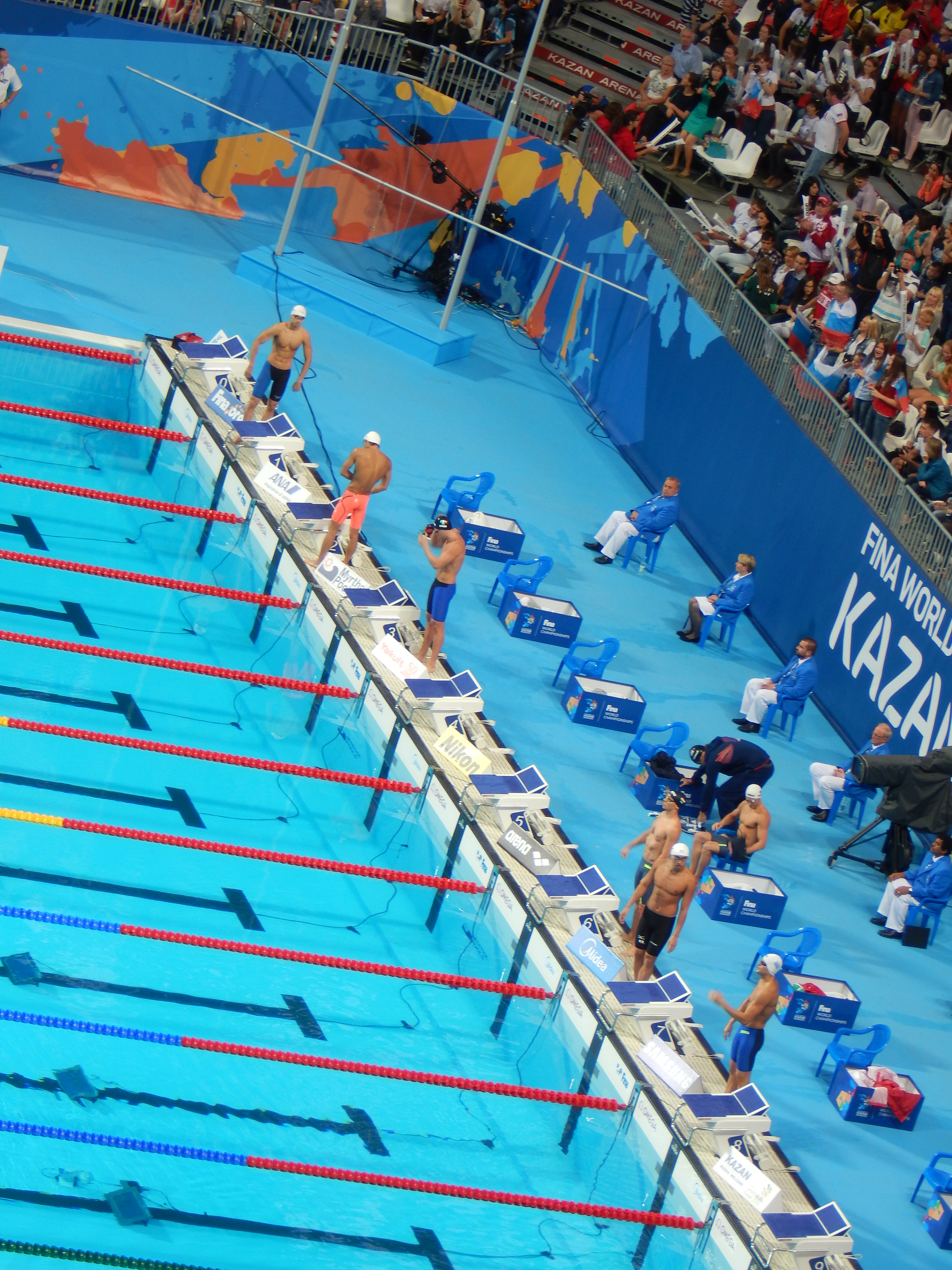 Первый полуфинал на дистанции 50 метров вольным стилем у мужчин в Казани